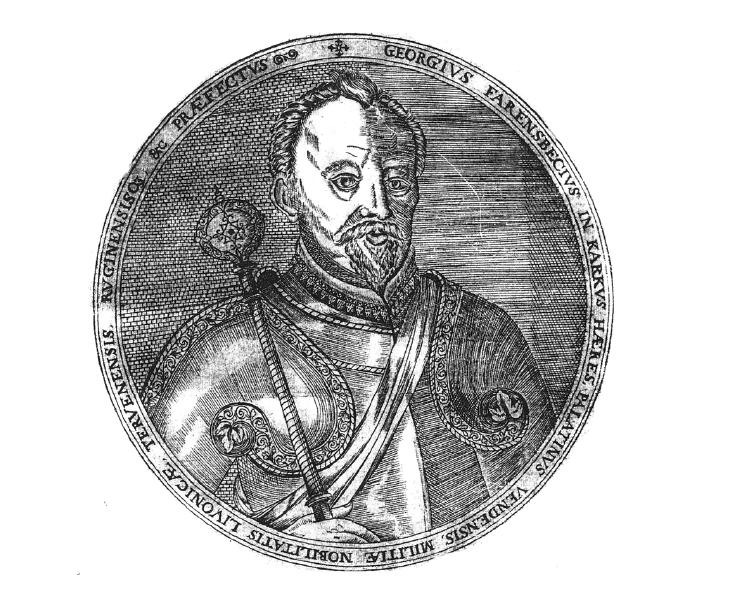 Jürgen von Fahrensbach (1551-1602), estonian soldier